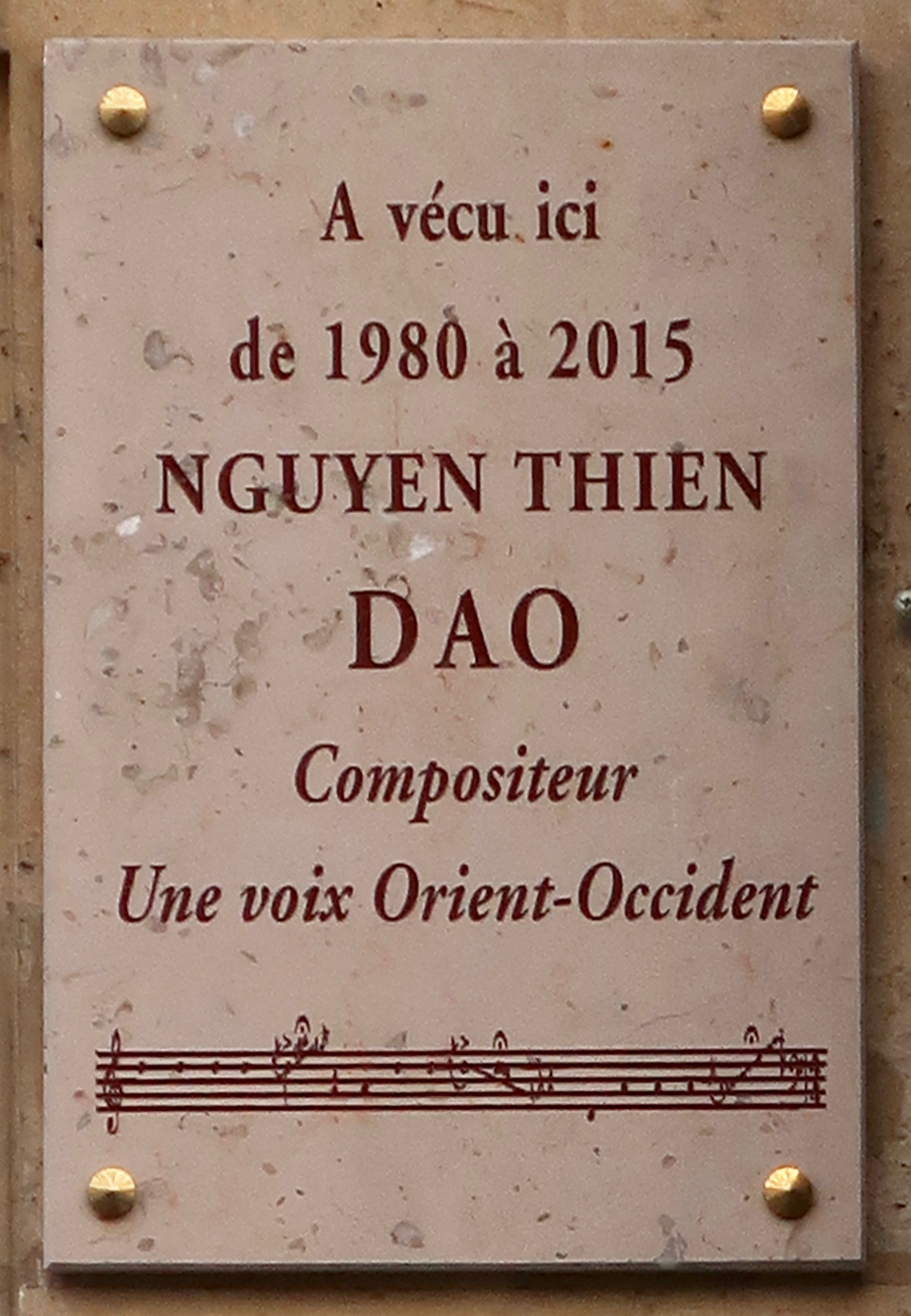 Plaque Nguyen Thien Dao, 28 rue Madame (Paris 6e).